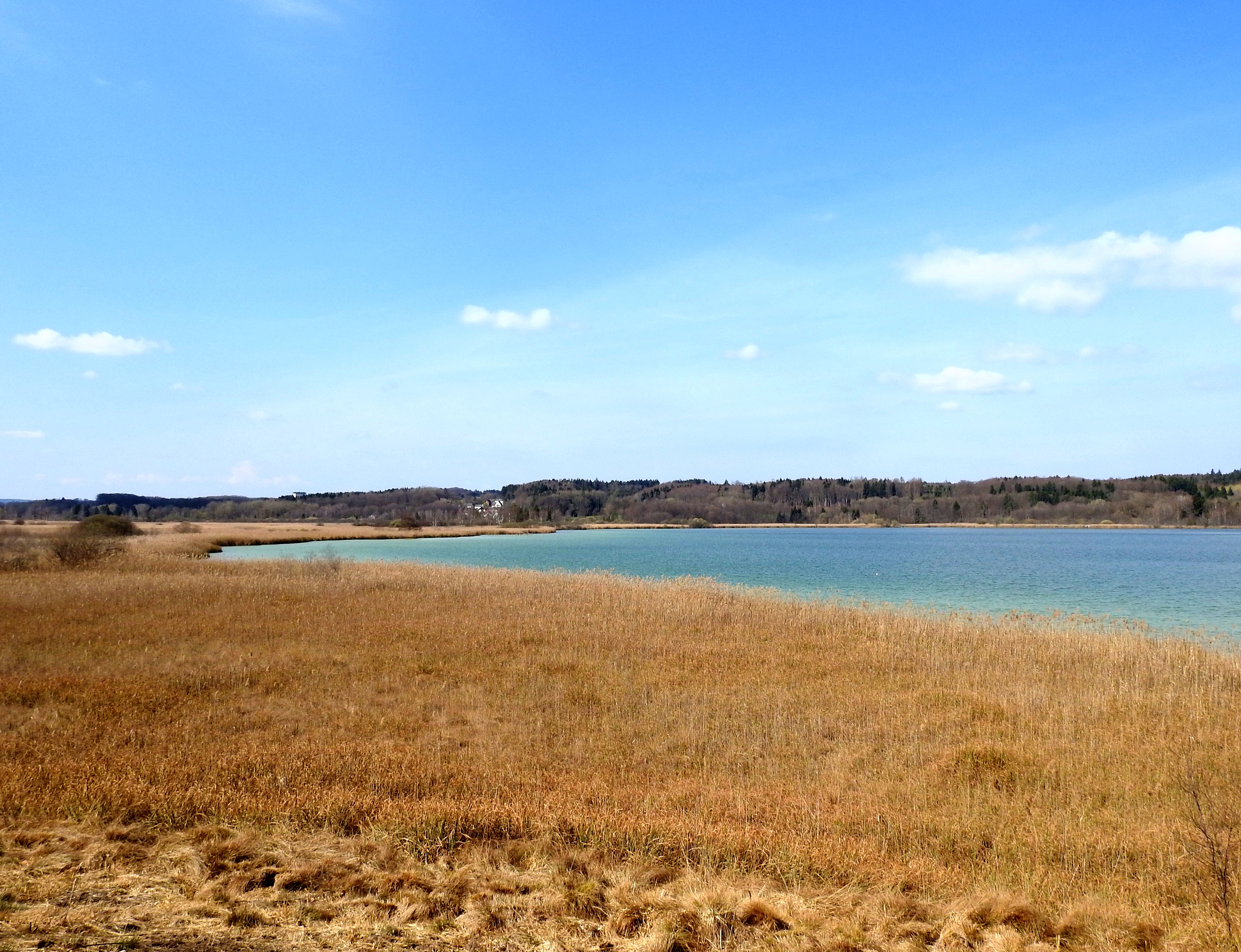 Naturschutzgebiet Herrschinger Moos zwischen Ammersee und Pilsensee.